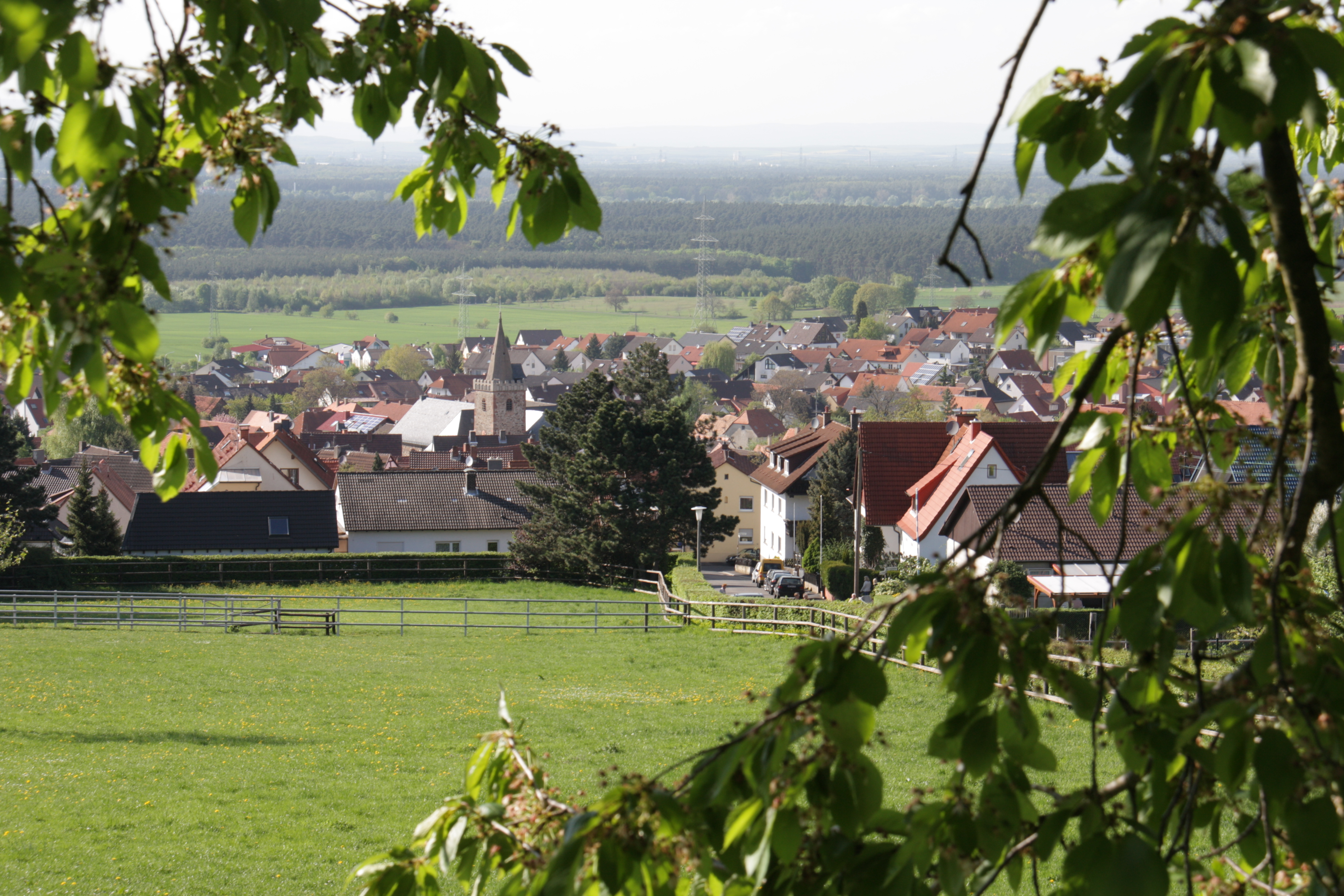 Blick vom Königsberg auf den Alzenauer Stadtteil Hörstein